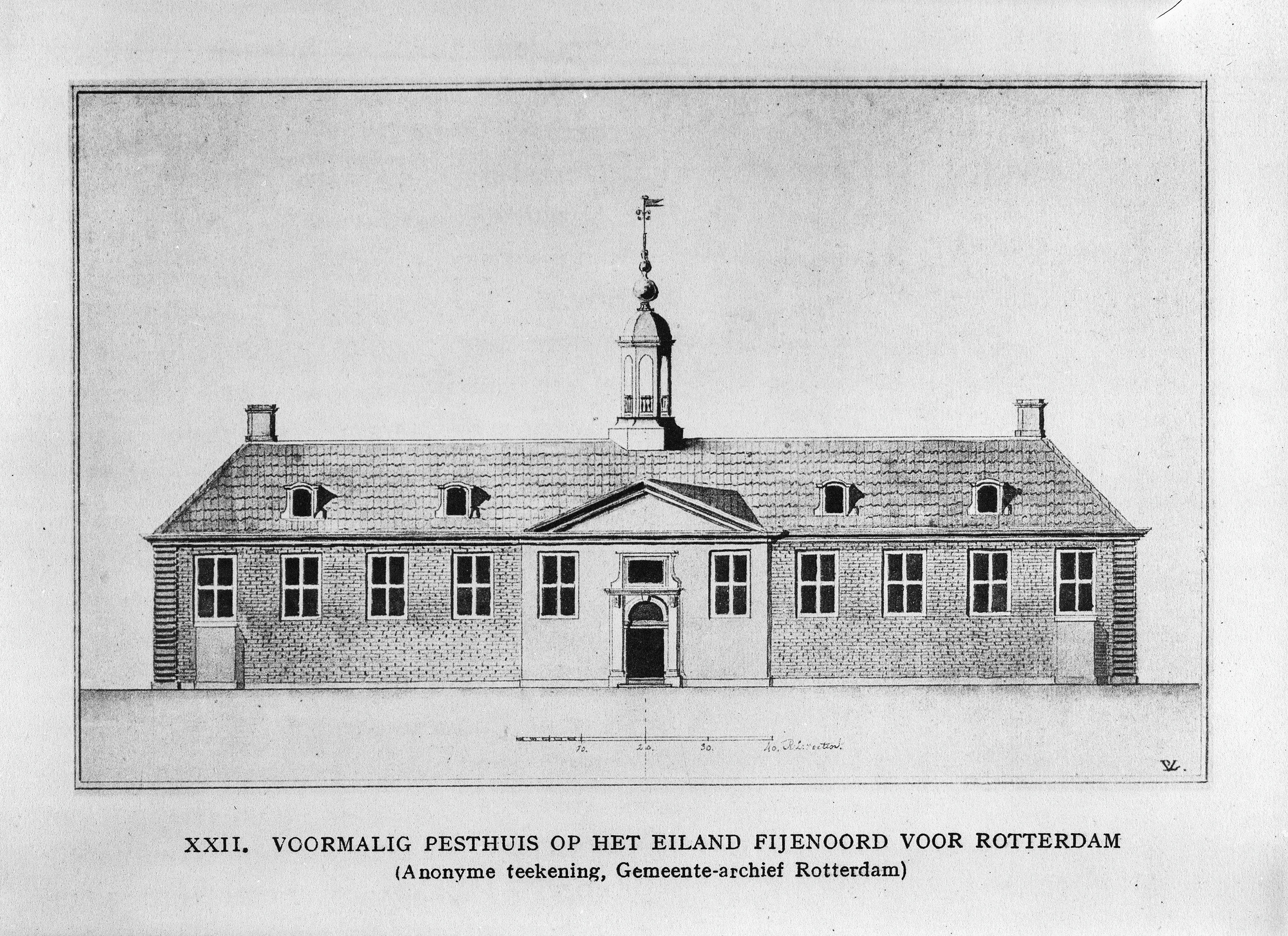 voormalig Pesthuis: tekening, anoniem Gemeente archief Rotterdam This is a possible Rijksmonument:Find the monument in the Monuments database:in RotterdamAll Rijksmonumenten in RotterdamIs this a Rijksmonument?YesNoMore information about this project and help. More images to work at in Category:Possible Rijksmonumenten.